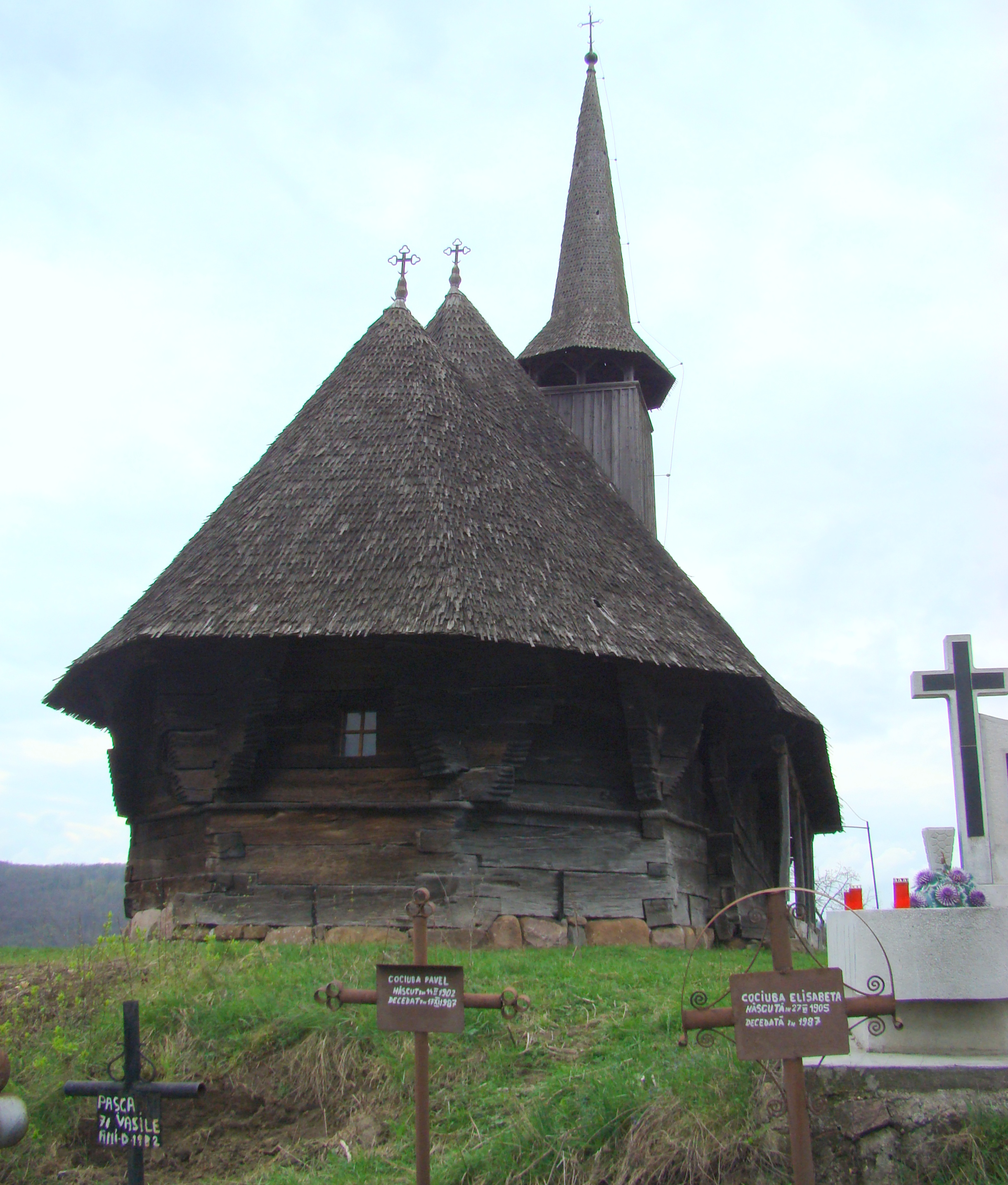 Biserica de lemn din Surduc, județul Bihor